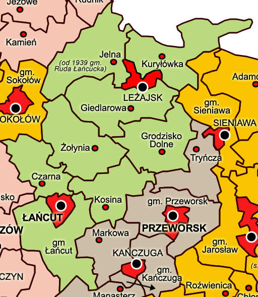 Ланьцютський повіт